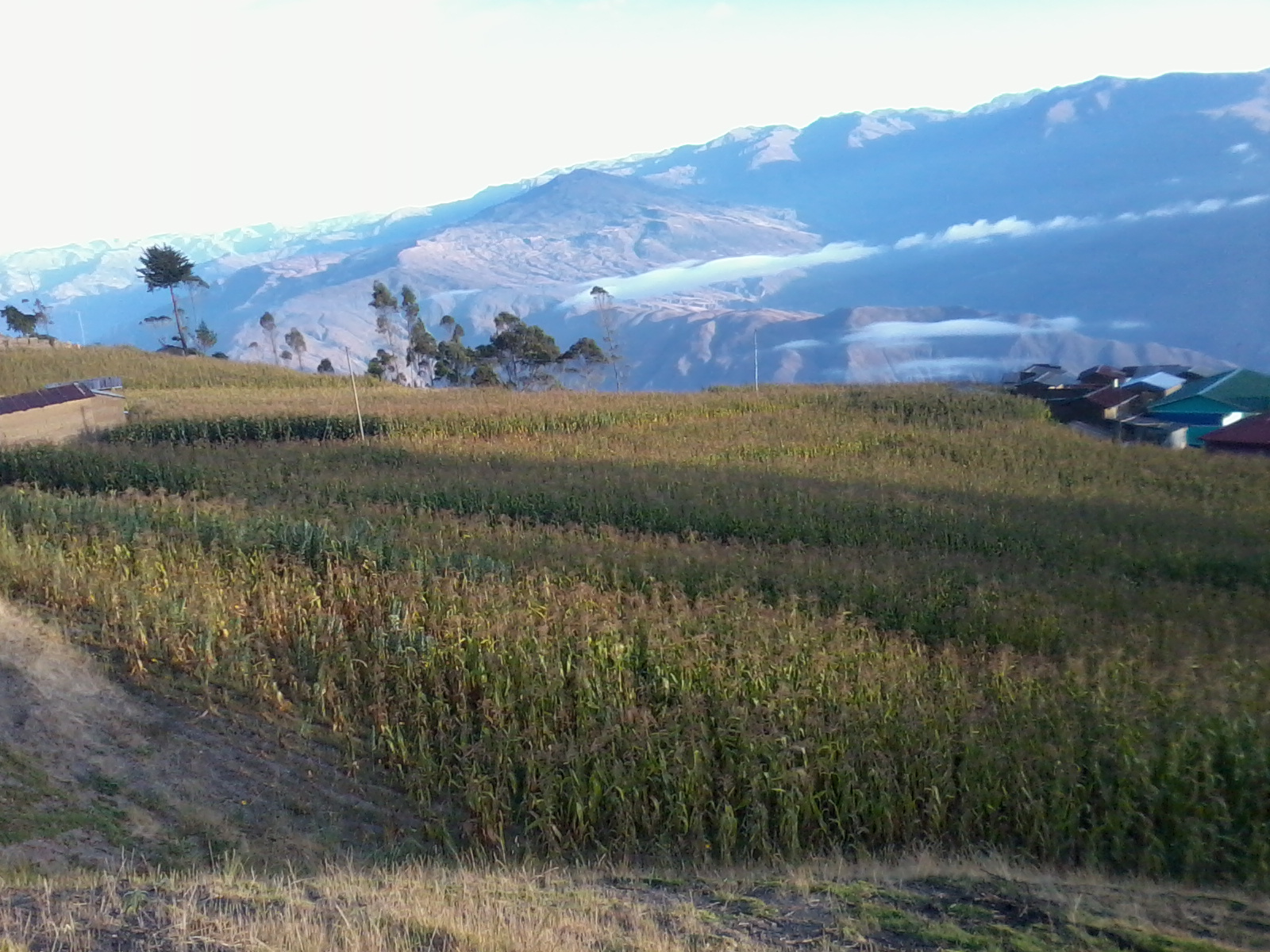 La comunidad de Tarata se ubica en municipio de Quiabaya de Provincia Larecaja del departamento de La Paz - Bolivia